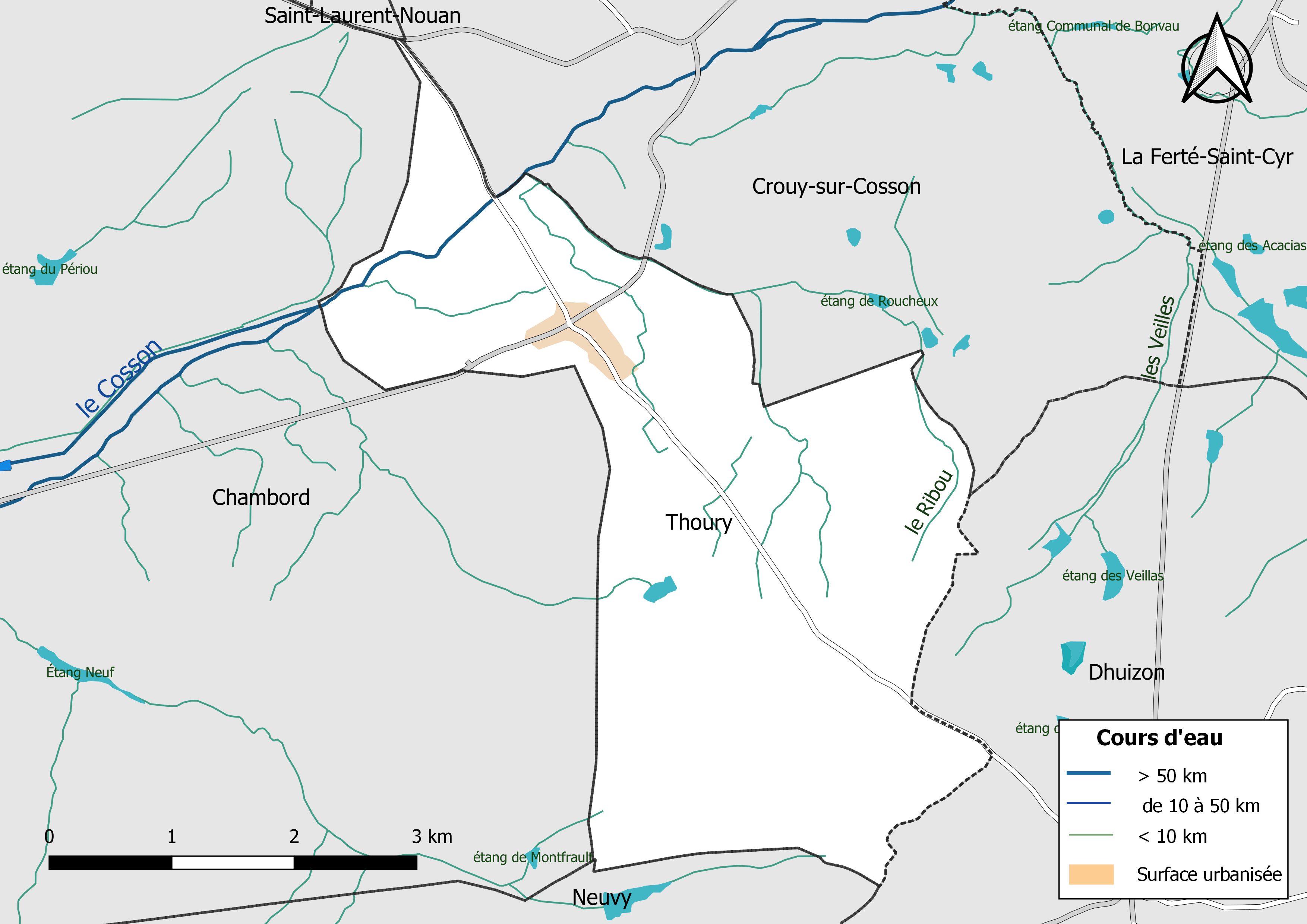 Carte du réseau hydrographique de la commune de Thoury (Loir-et-Cher, France).